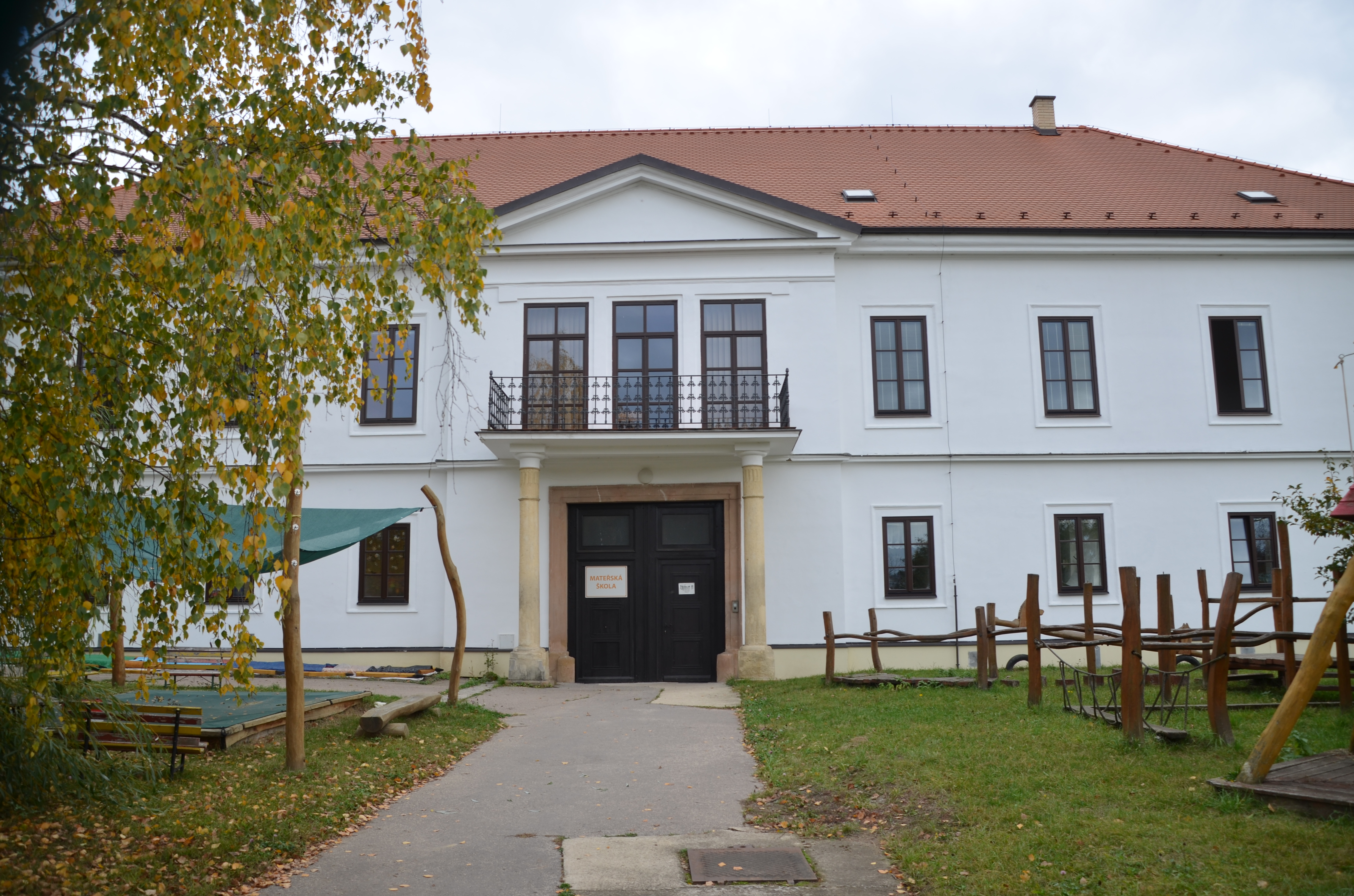 Zámek Kociánka, Královo Pole, Kociánka 2084/4, 2803/4a, 2129/6, Brno.